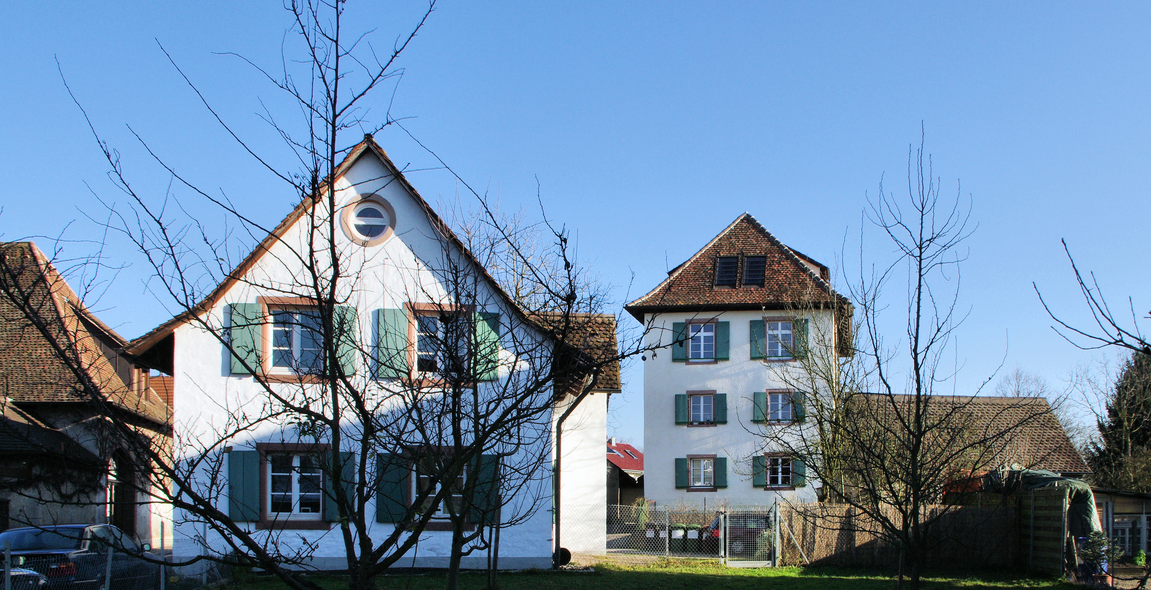 Links die Zehntscheuer rechts die Gebäude des alten Schloßes in Lehen